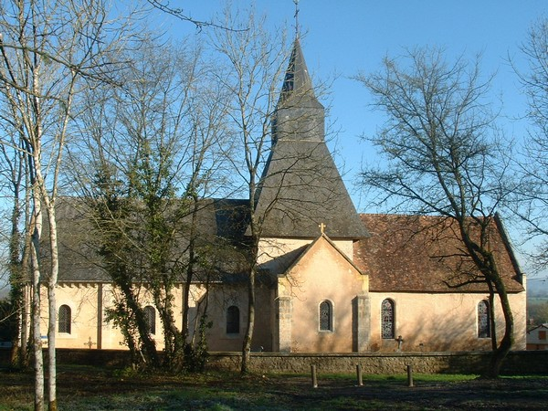 église saint Martin de Boitron